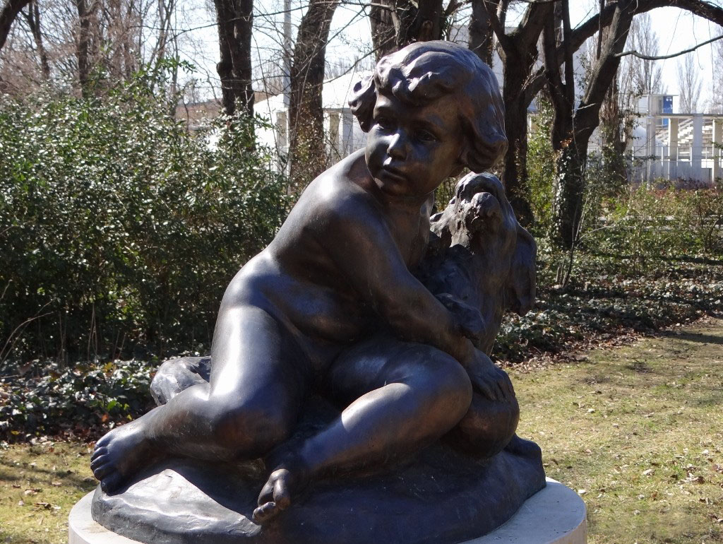 Gosztonyi Alice Gyermek kutyával című bronzszobra Budapesten, a Margit-szigeten (1930) – rekonstruckció, az eredetit 1995-ben ellopták